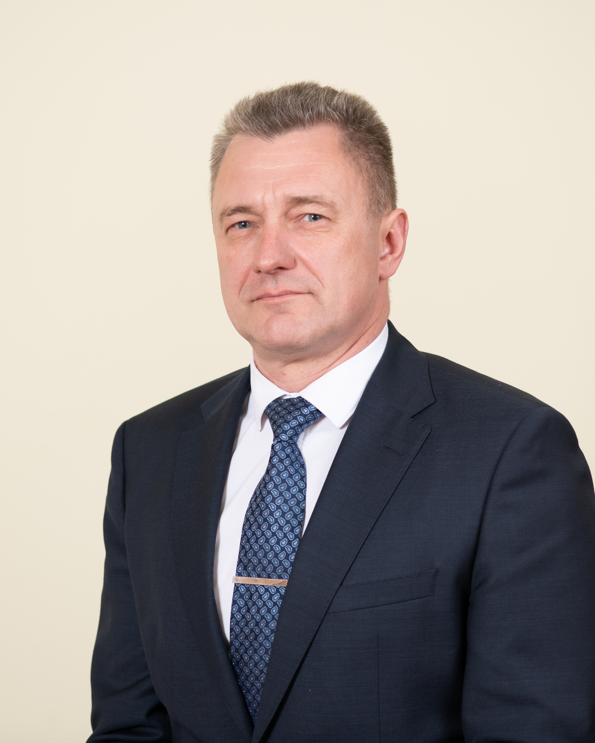 Rein Suurkask